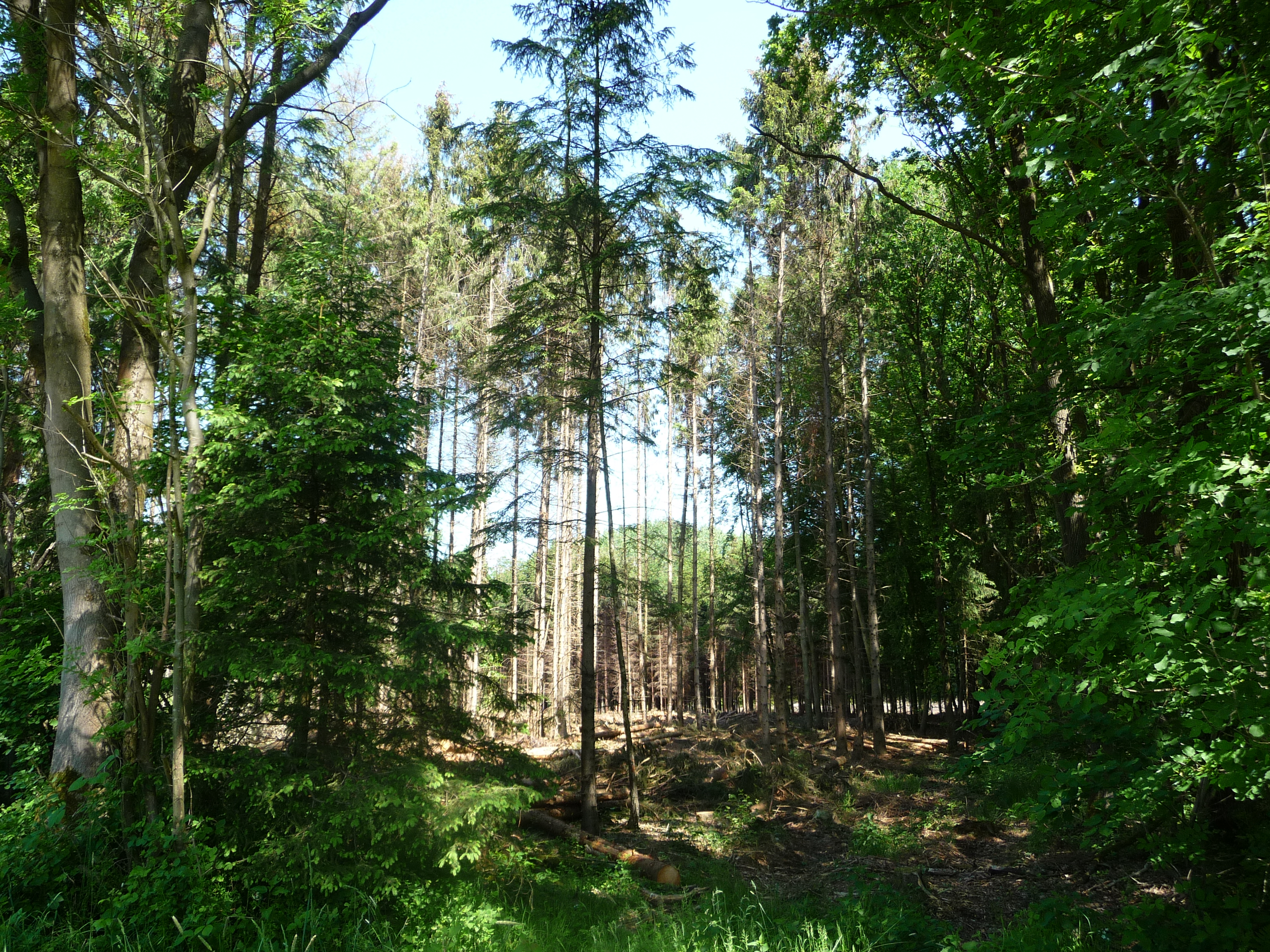 Dieses Landschaftsschutzgebiet ist dadurch gekennzeichnet, dass überall rote Fahrräder herumstehen und an den Bäumen hängen - die Aktion soll auf den fehlenden Radweg hinweisen.